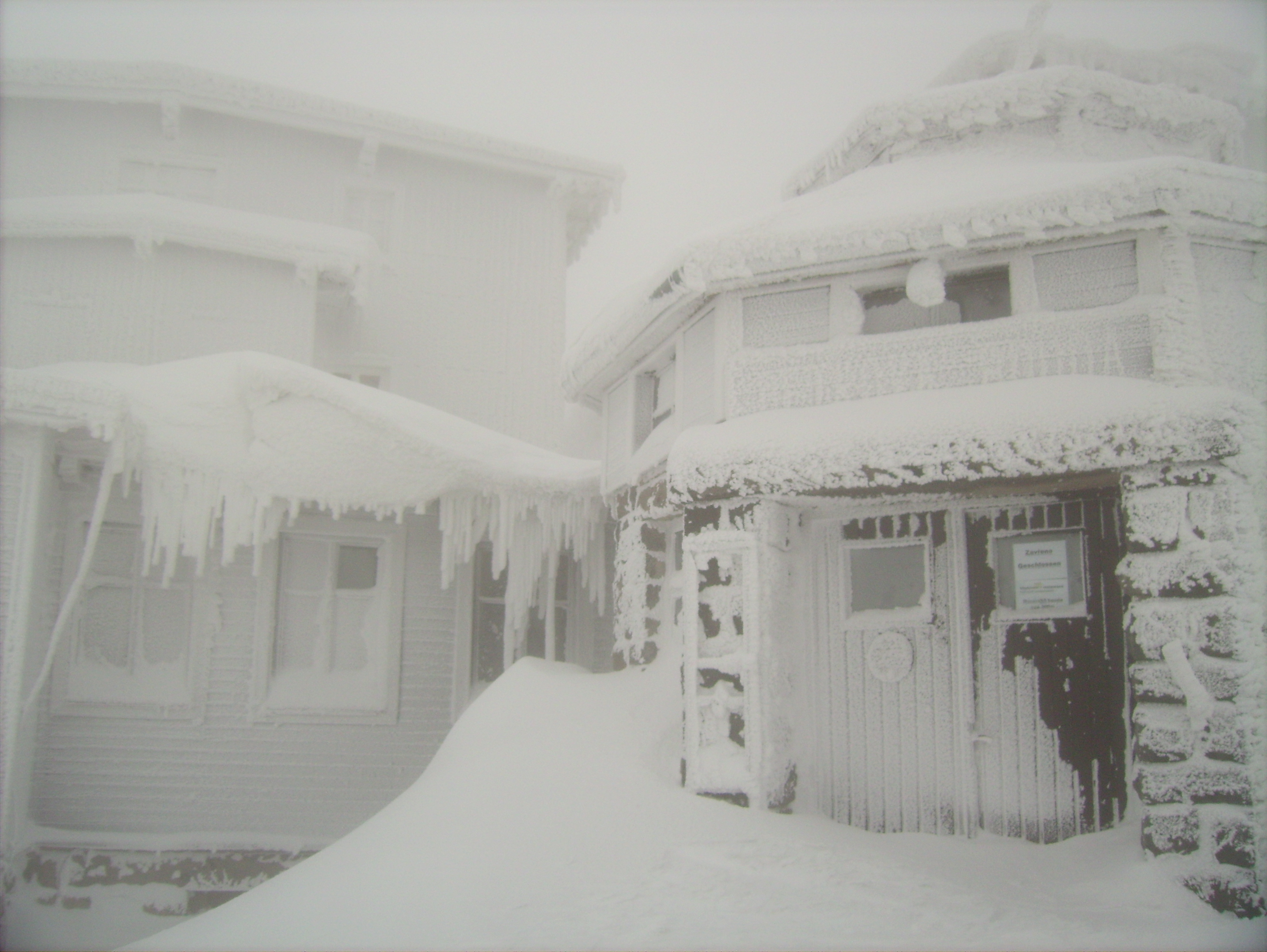 Eingang Peterbaude im winter 08